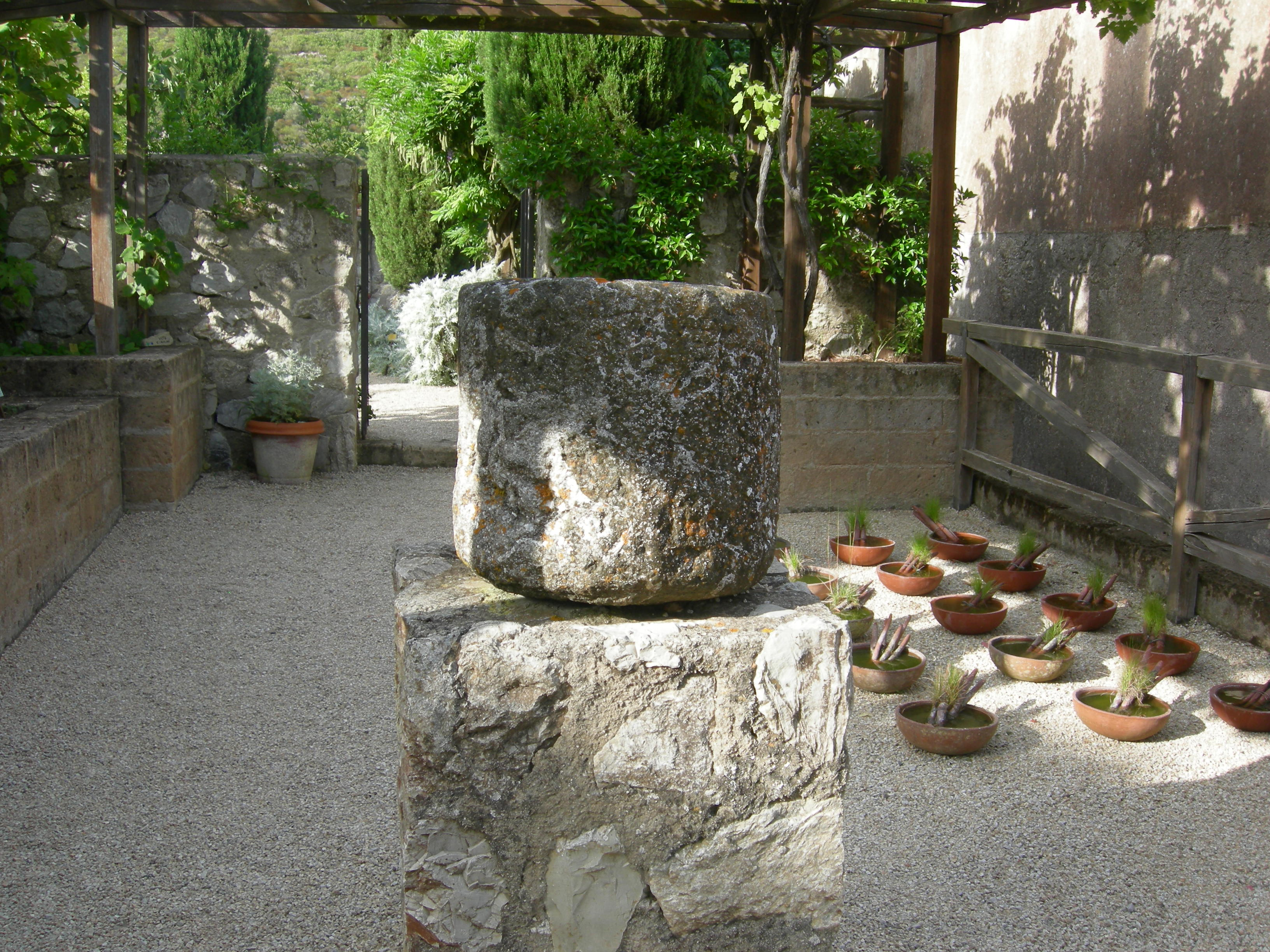 Il pergolato dell'Orto dei Semplici Elbano, Eremo di Santa Caterina, Rio nell'Elba.